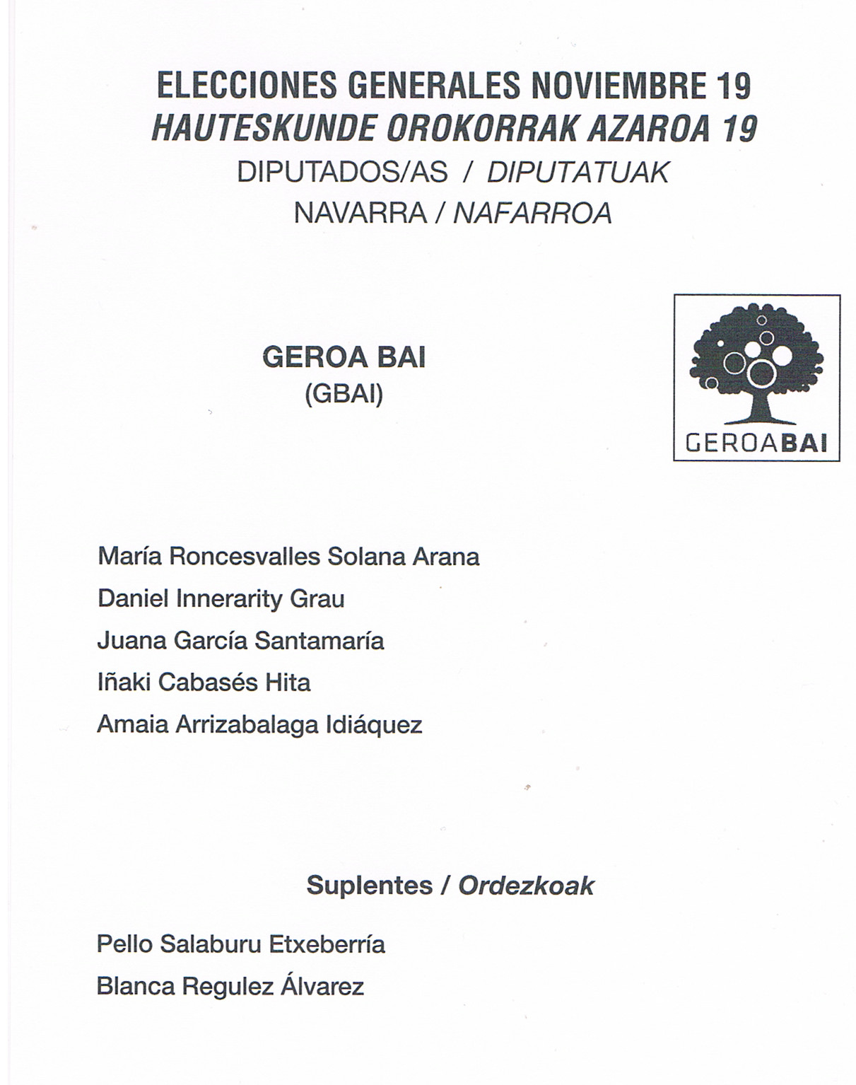 Papeleta electoral de Euskal Herria Bildu (EH Bildu) para el Congreso - Elecciones Generales de España de noviembre de 2019, circunscripción de Navarra.